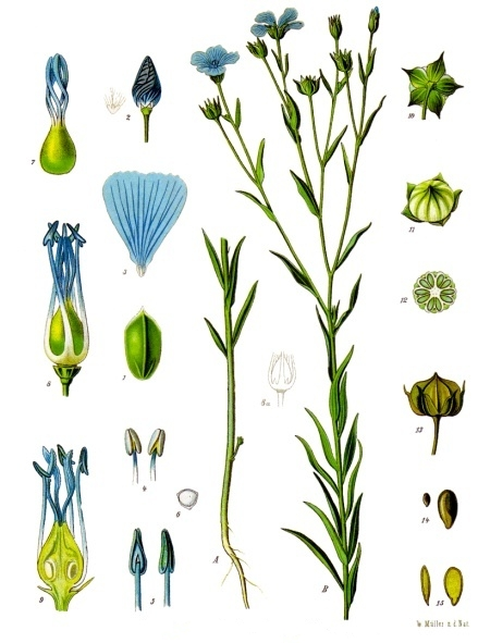 Lein. A B Pflanze in natürl. Grösse; 1 Kelchblatt, vergrössert; 2 Blüthenknospe ohne Kelch, desgl.; 3 Kronblatt desgl.; 4 u. 5 Staubgefässe von verschiedenen Seiten, desgl.; 6 Pollenkorn, desgl.; 7 Stempel mit zusammengedrehten Griffeln, desgl.; 8 Blüthe von Kelch und Krone befreit, ohne die unfruchtbaren Staubgefässe, desgl.; 8a dieselbe mit den unfruchtbaren Staubgefässen desgl.; 9 dieselbe im Längsschnitt, desgl.; 10 u. 11 junge Frucht von verschiedenen Seiten, desgl.; 12 dieselbe im Querschnitt, desgl.; 13 reife Frucht, desgl.; 14 Same, natürl. Grösse und vergrössert; 15 derselbe im Längsschnitt, desgl.